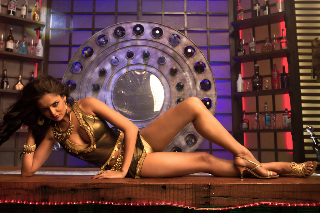 Nathalia Kaur in Department song 'Dan Dan' Hindi: नतालिया कौर डिपार्टमेंट गीत दनदन में